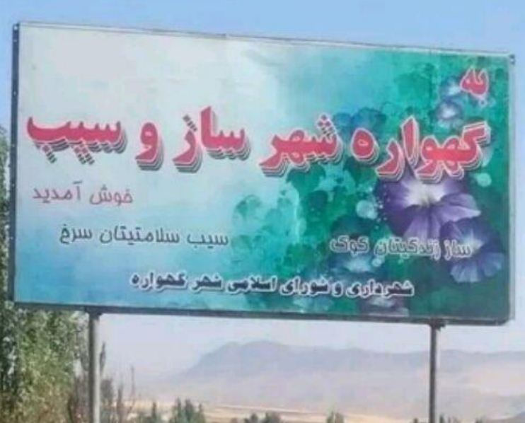 تابلو ورودی به شهر گهواره